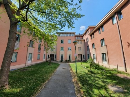 Breitenfurter Fisch, Blick in einen Innenhof der U-förmigen Mehrfamilienhäusern